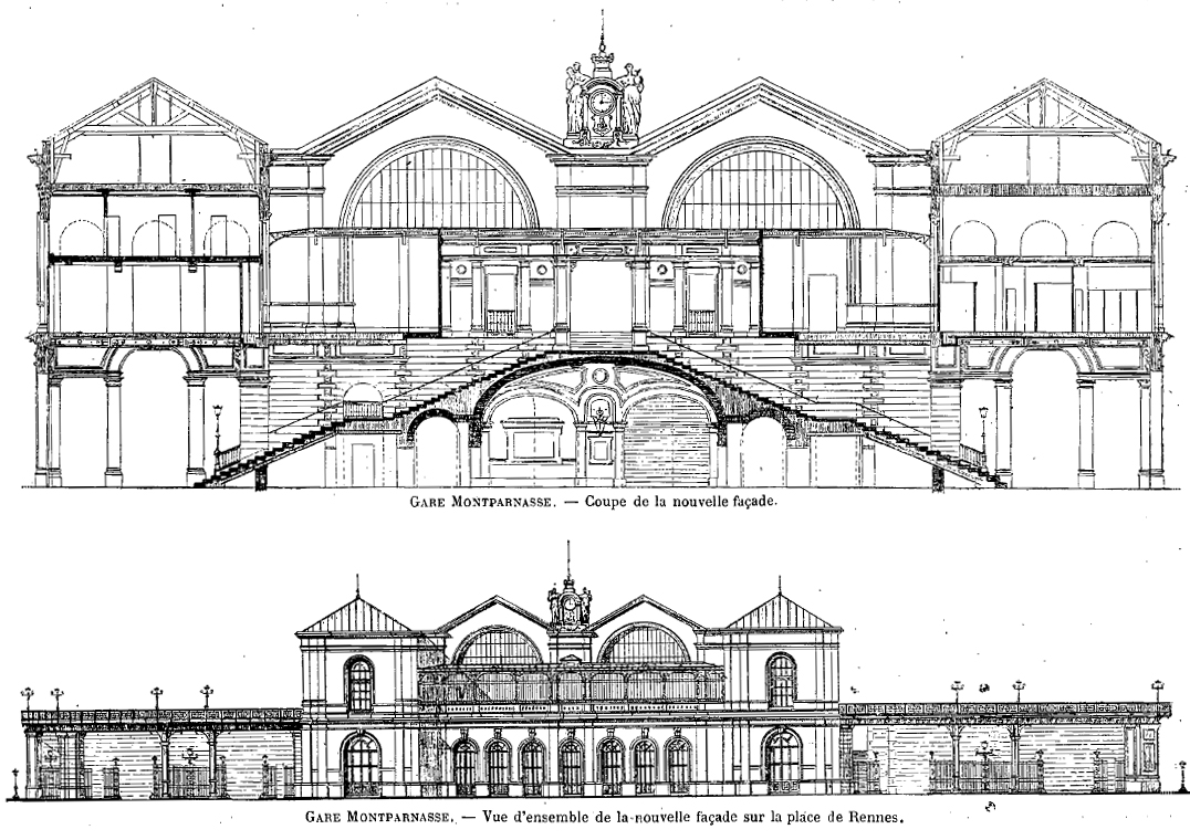 Elevation et coupe de la Gare Montparnasse de 1898